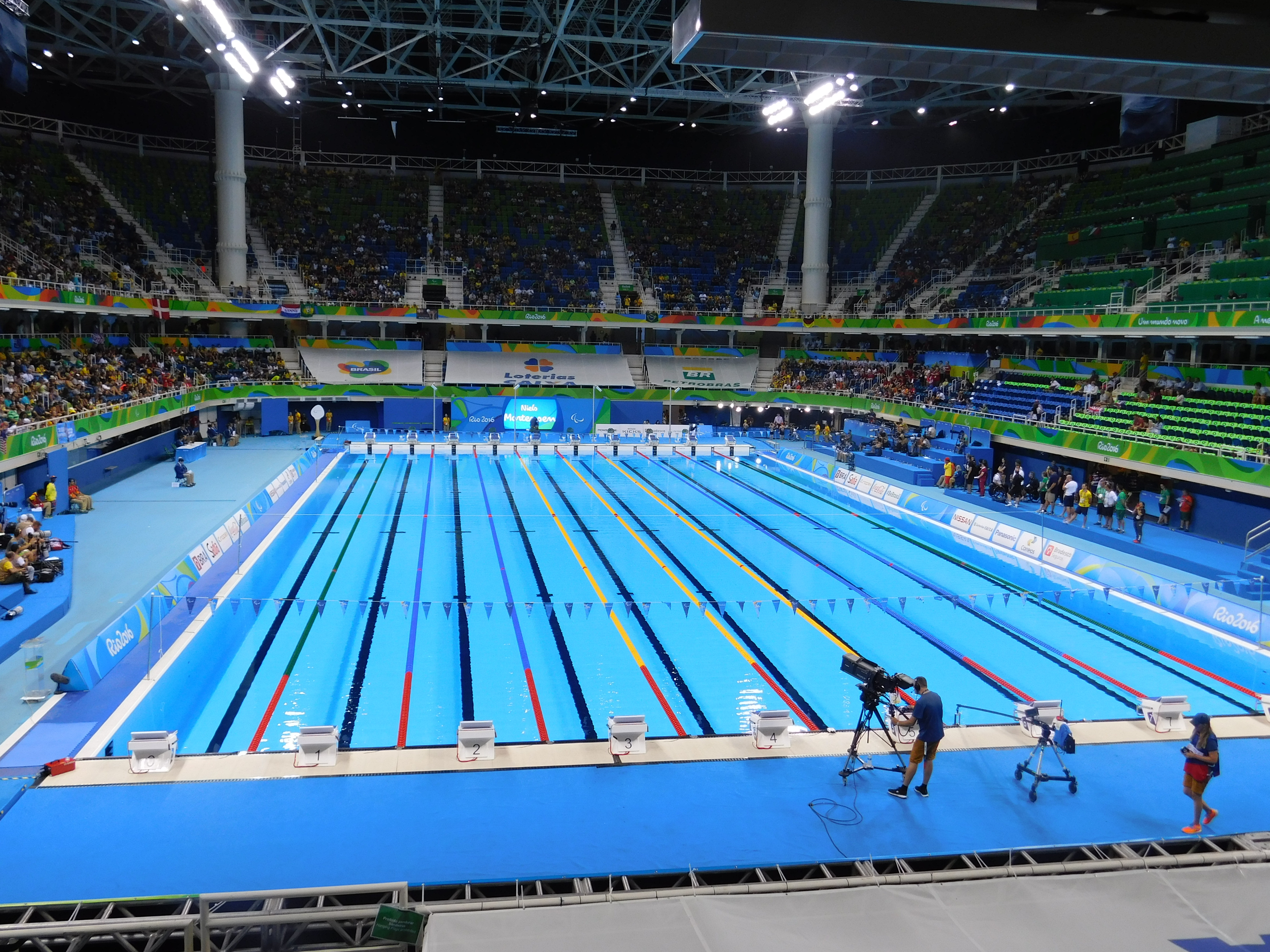 Piscina usada nos Jogos Olimpicos e Jogos Paralimpicos Rio 2016